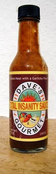 Dave